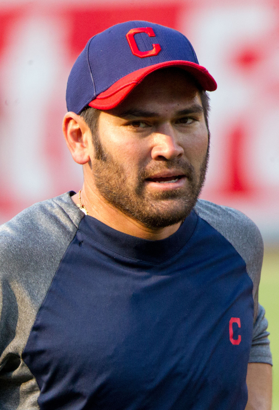 Johnny Damon